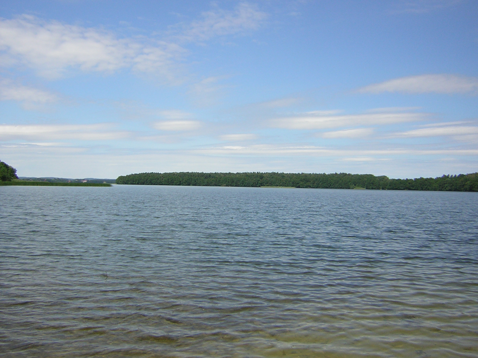 Jezioro Dąbrowa Wielka w Leszczu